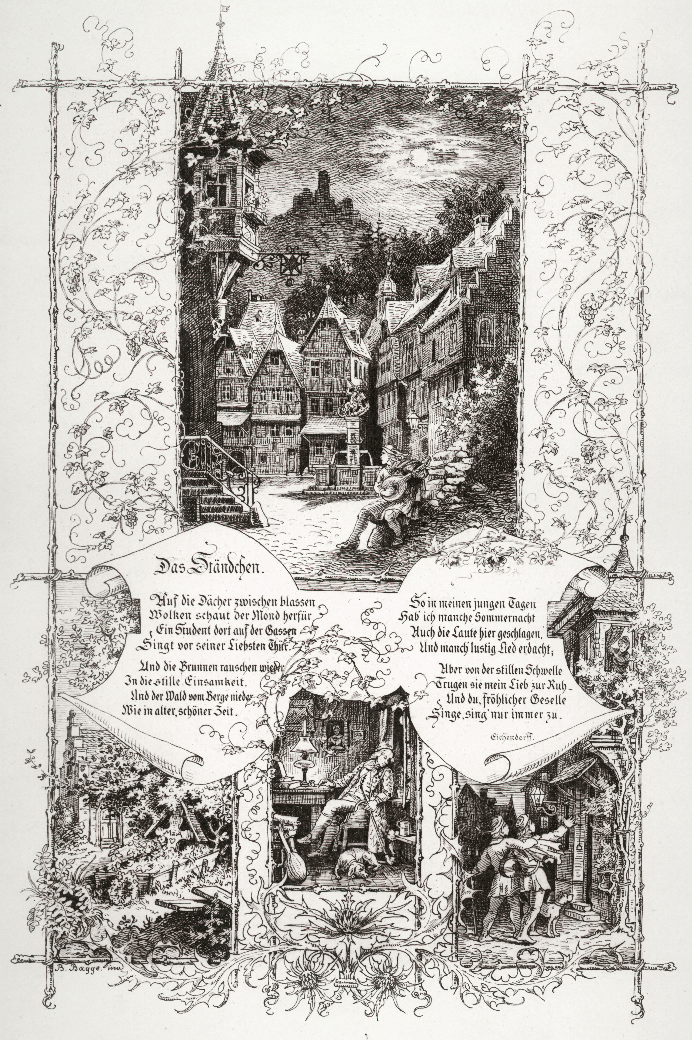 Illustration von Bertha Bagge zu dem Gedicht "Das Ständchen" von Joseph von Eichendorff